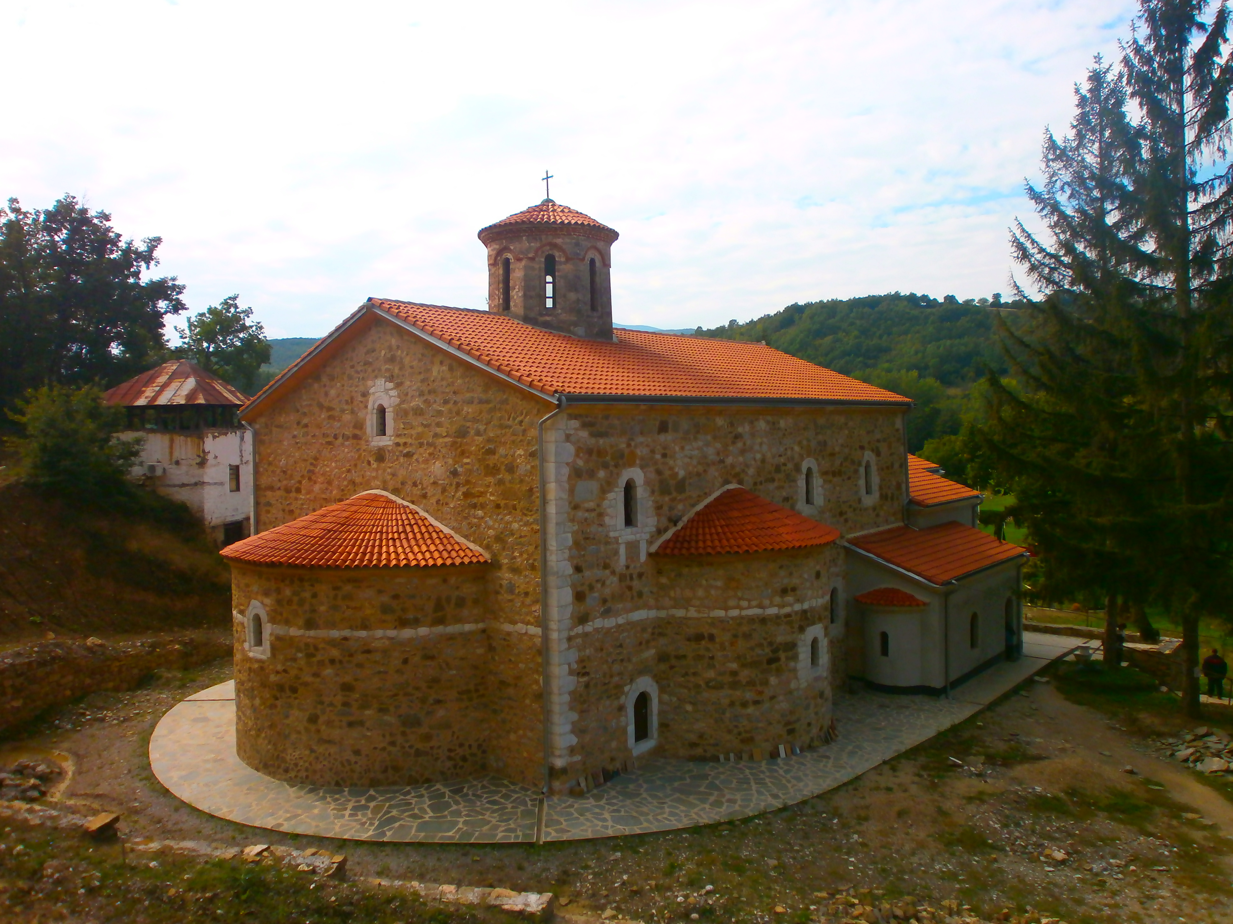 Srpski (latinica): Manastir Sukovo, Pirot